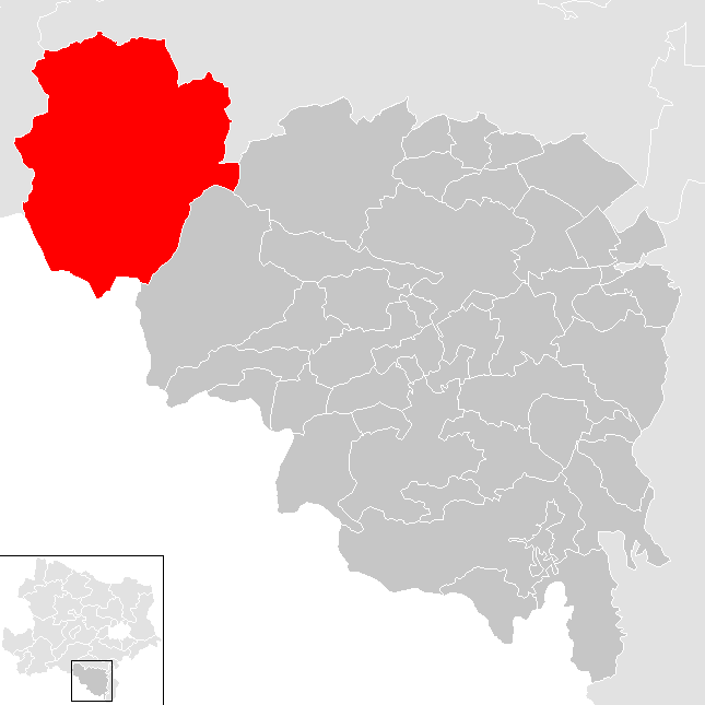 Bezirk Neunkirchen